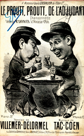 Le proutt, proutt, de l'adjudant chansonnette créée par Monsieur Garnier à l'Alcazar d'été. Description complète medihal-00722988